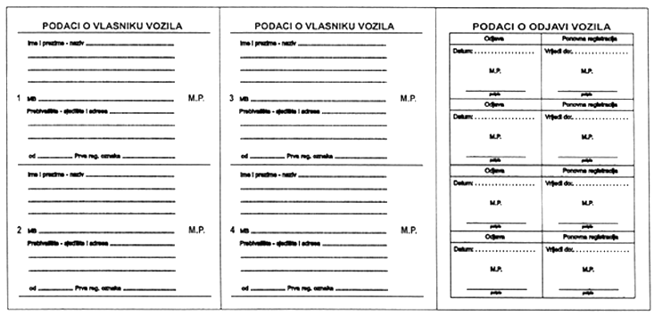 Izgled stražnje strane knjižice vozila